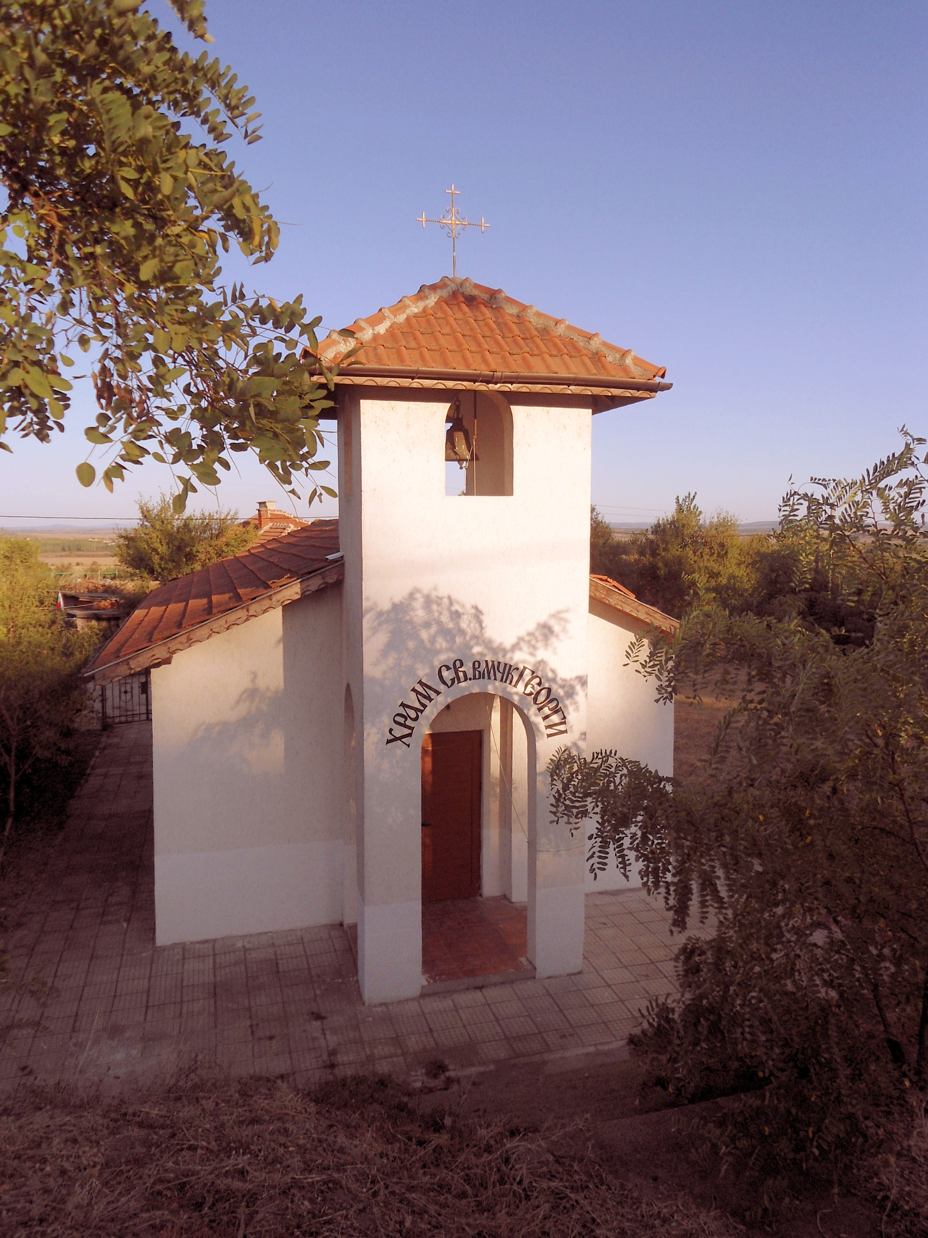 Църквата „Св. вмчк. Георги“ в с. Изгрев, област Ямбол.